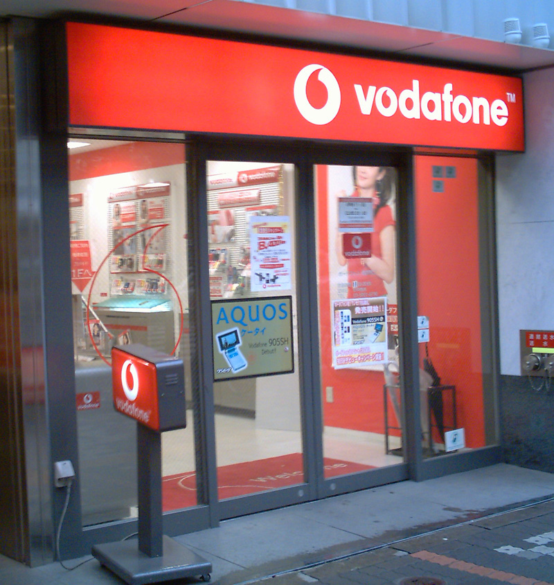 Vodafone_SHOP_ikebukuro_japan photography day, 2006.9.12. photography person, kisi